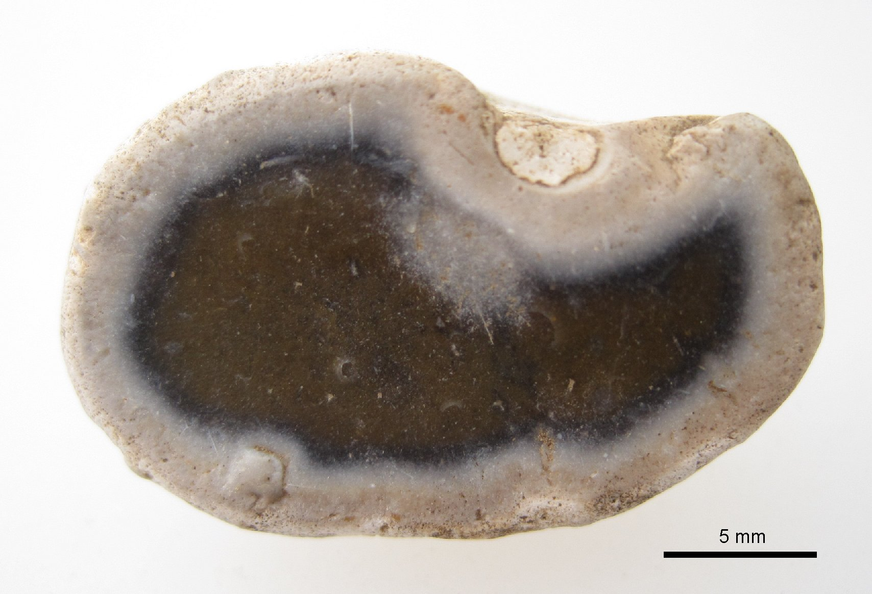 Flintstone